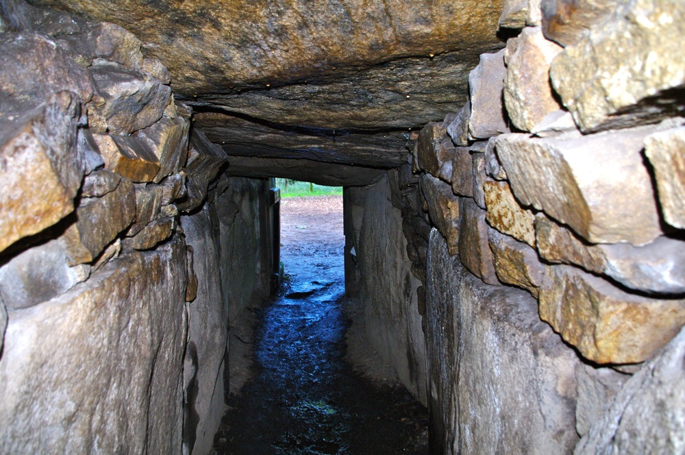 Vue intérieur de l'allée d'entrée du tumulus de Kercado à Carnac, 6500 ans avant le présent